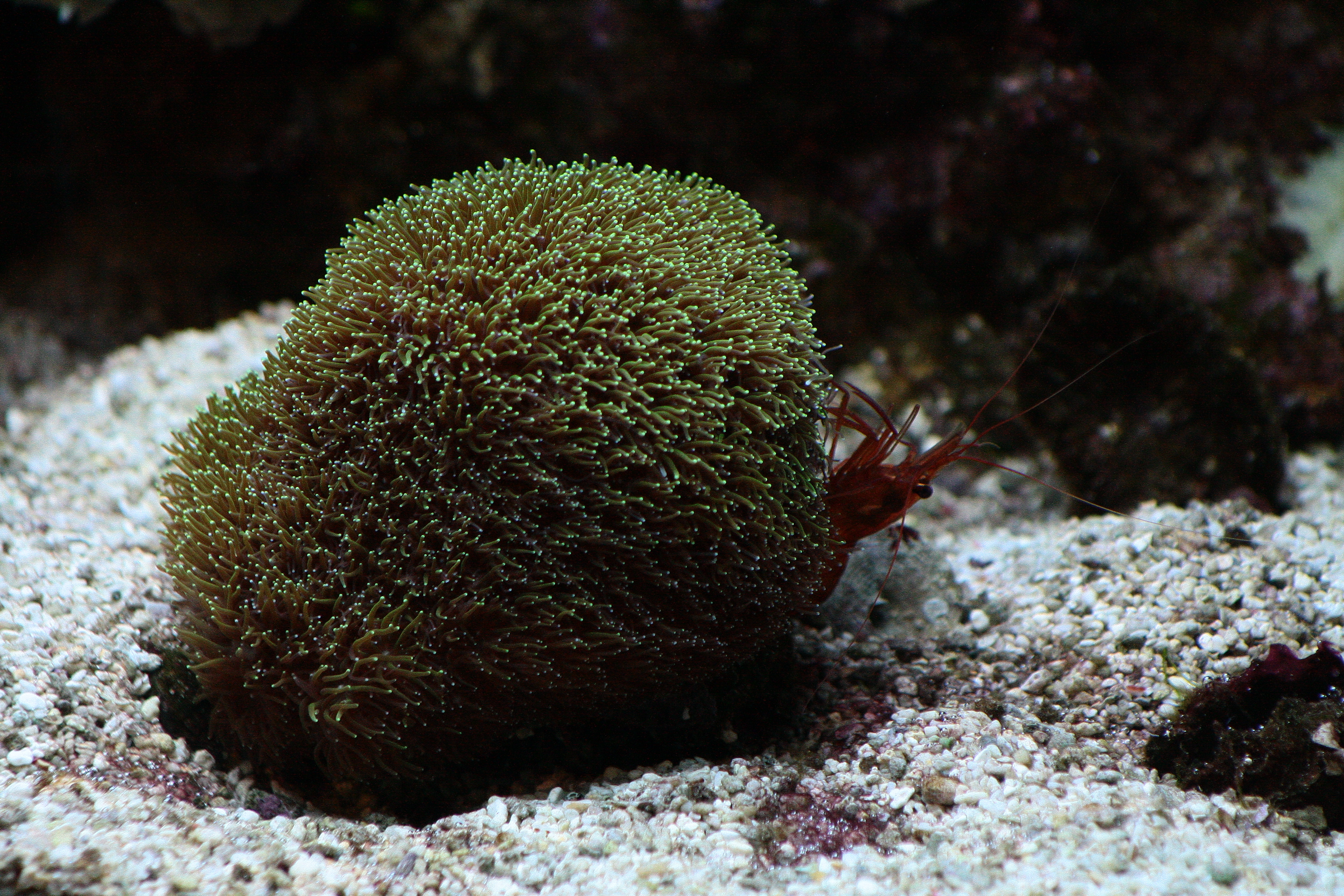 Galaxea fascicularis con Lysmata Wurdemanni en acuario